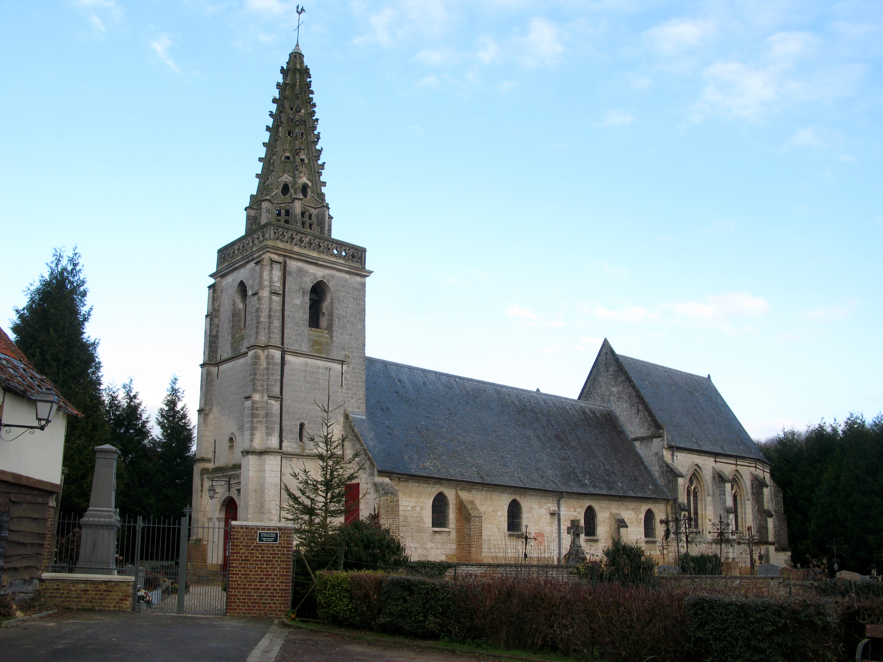 Cocquerel (Somme, France) - L'église Saint-Martin. .